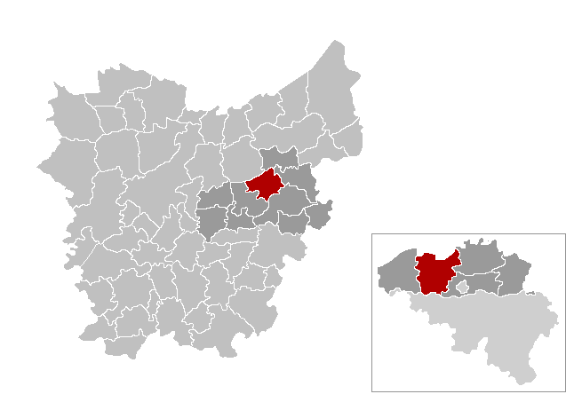 Gemeentekaart, eigen werk Categorie:Kaart met locatie Belgische gemeente